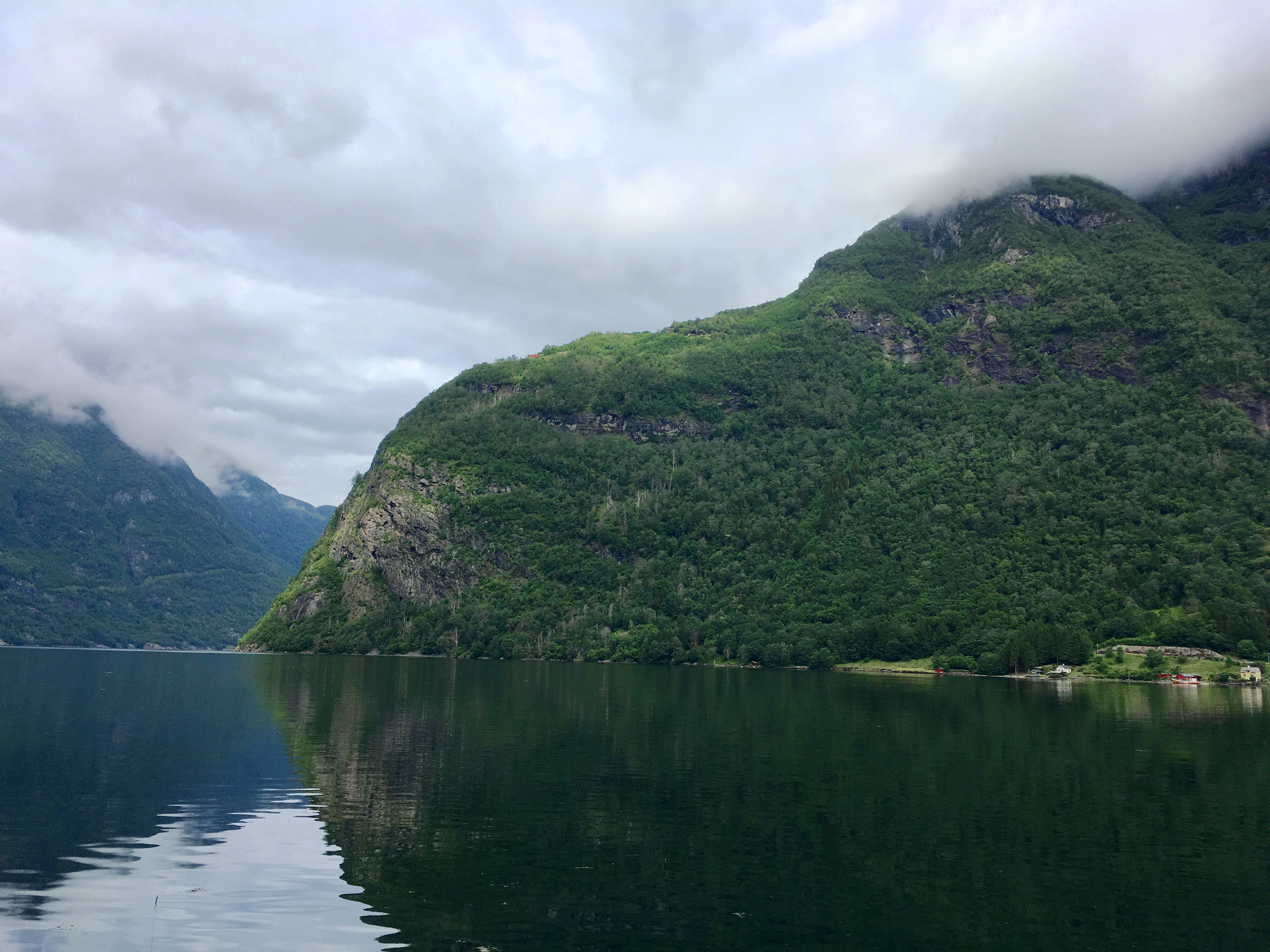 Bilete teke ved Valsviki mot Bungane, med utsyn over Framfjorden.